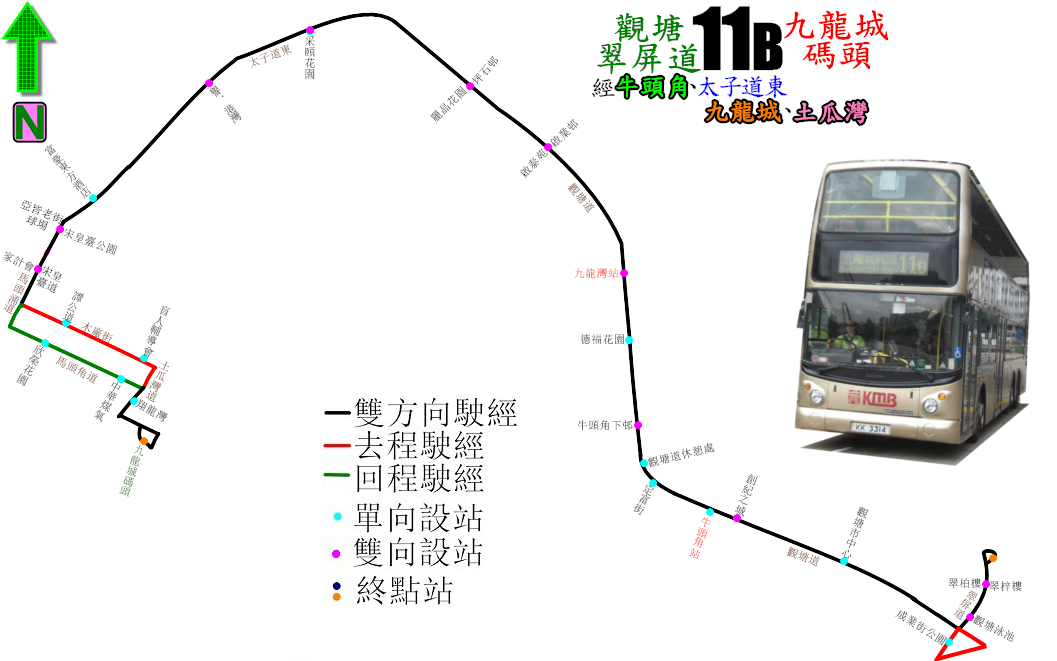 中文（香港）: 九巴11B線的走線圖